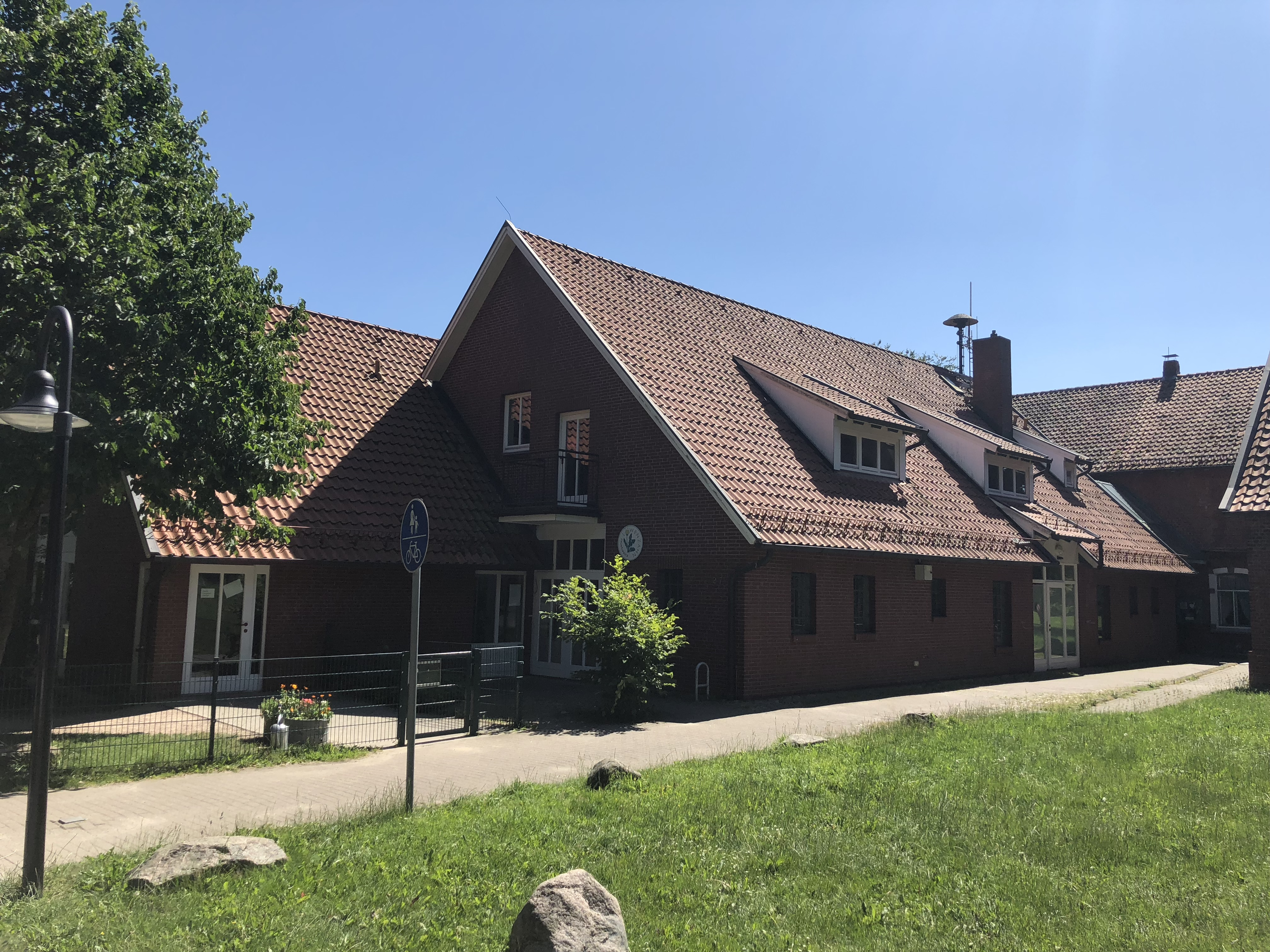 Vietshoff in Sounsiek